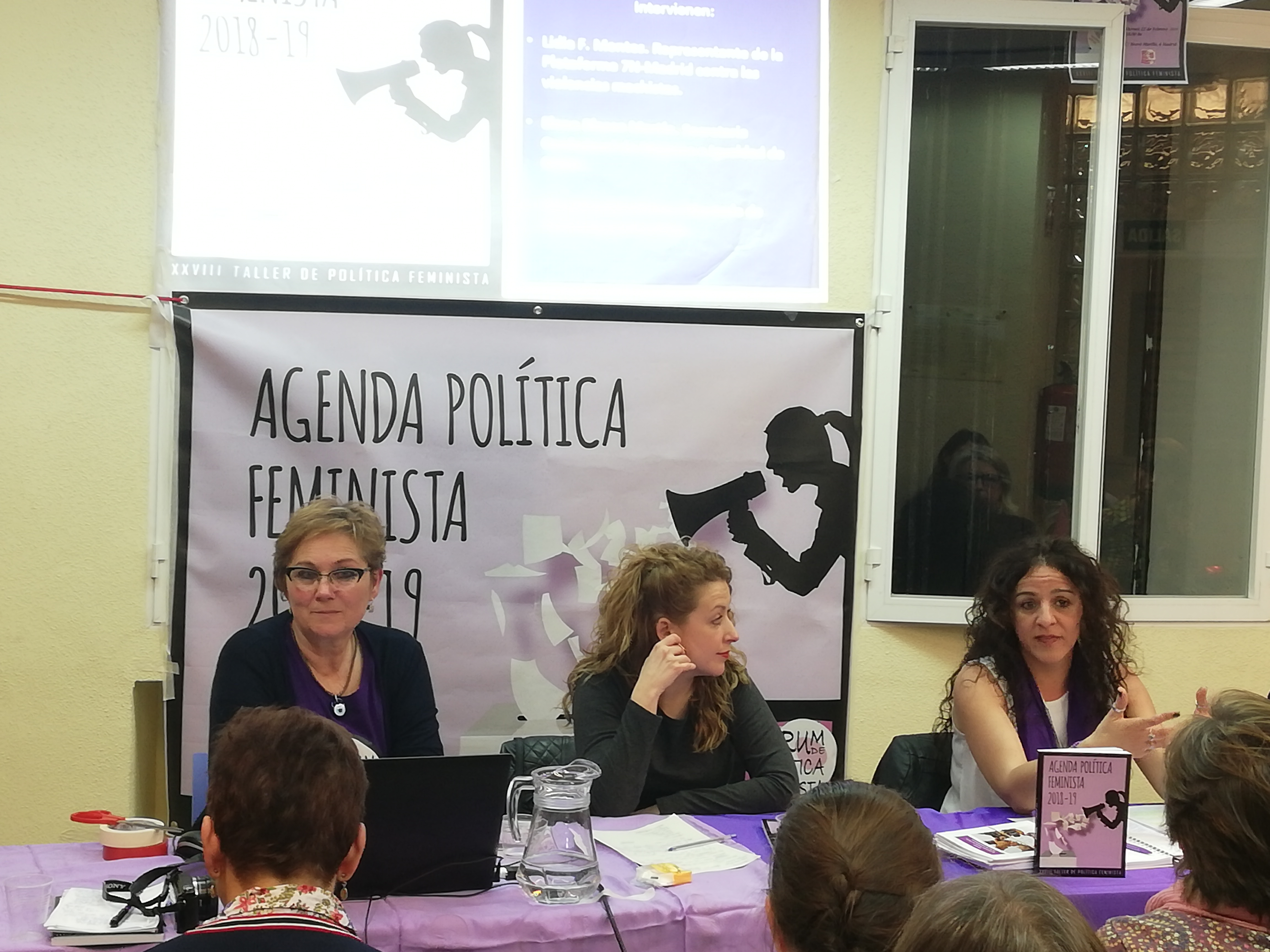 Acto Agenda Política Feminista 2018 - 2019 organizado por el Fórum de Política Feminista con la participación de Paqui Guisado, Presidenta de Fórum de Política Feminista, Sara Carreño, diputada de Podemos La Rioja y Elena Blasco, CCOO